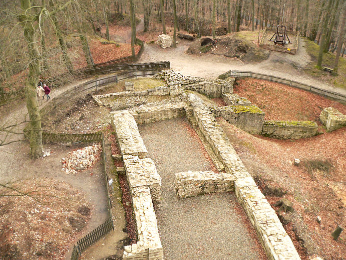 Ausgegrabene Fundamente der Burg Lichtenberg, Wirtschaftsgebäude, Kapelle, Torturm